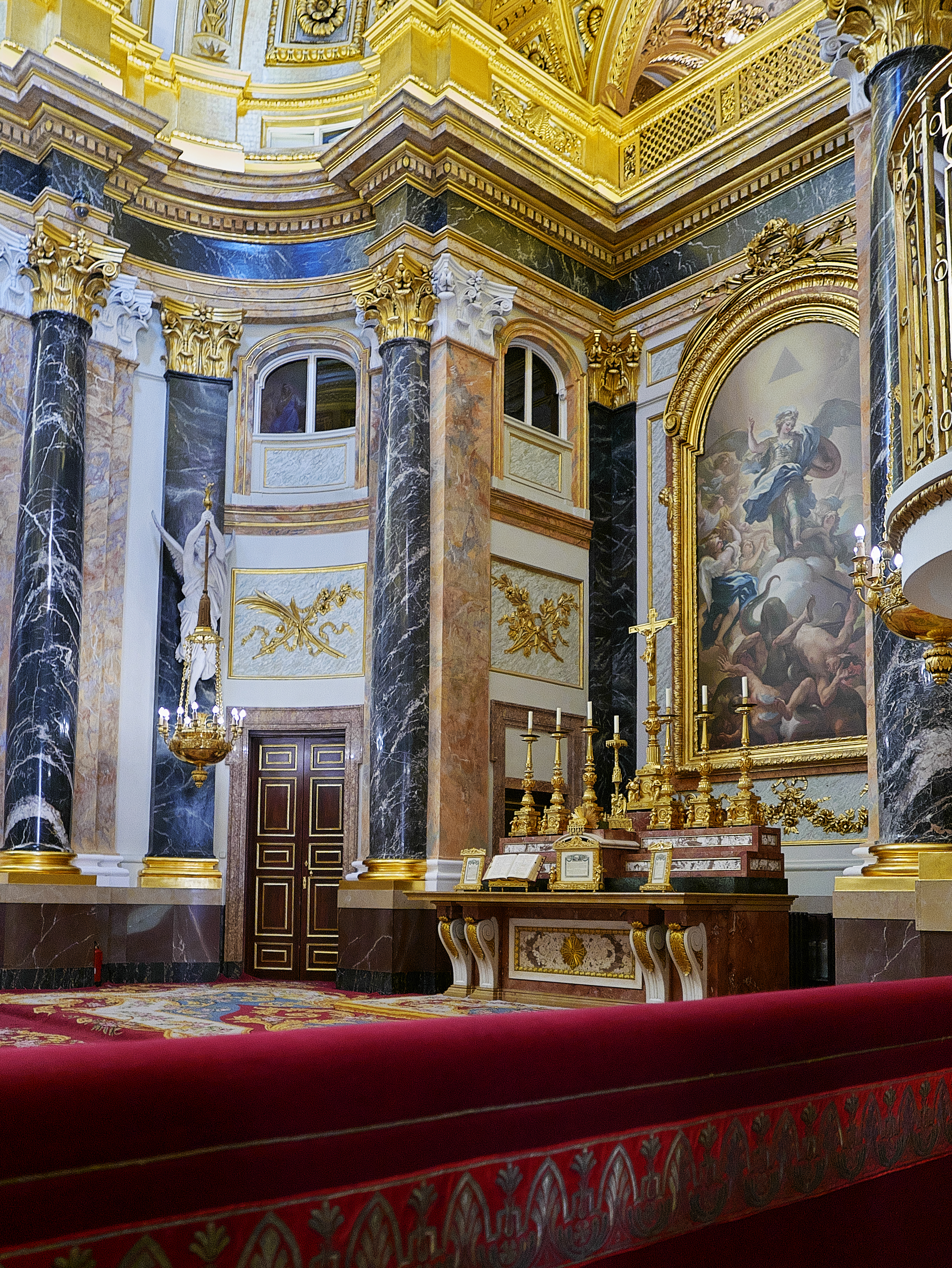 Palacio Real de Madrid. Altar de la capilla proyectada por Ventura Rodríguez (1750-1759).